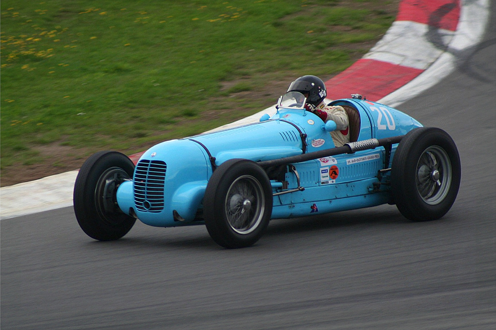 Maserati V8 RI, Baujahr 1935, beim AvD-Oldtimer-Grand-Prix 2011; Wagen von Philippe Étanclein. Vier Exemplare wurden gebaut.